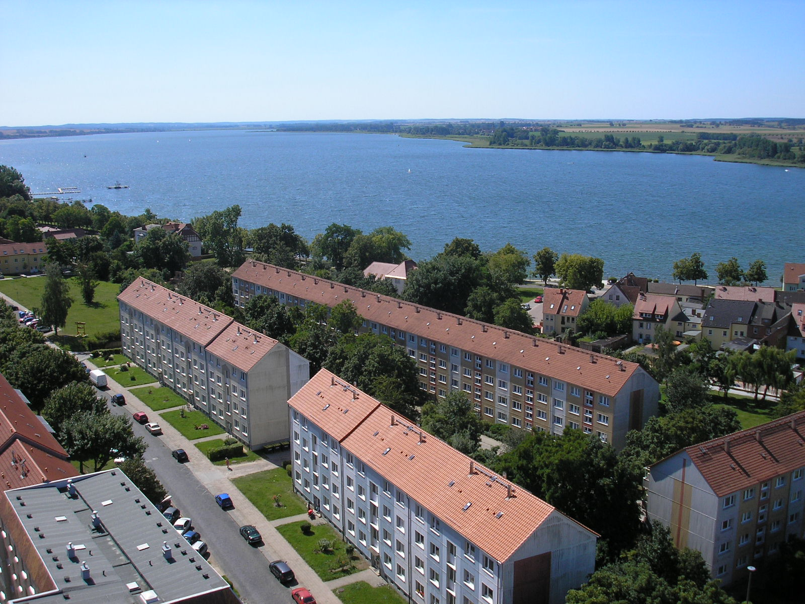 Blick über den Unteruckersee in Prenzlau (Brandenburg).